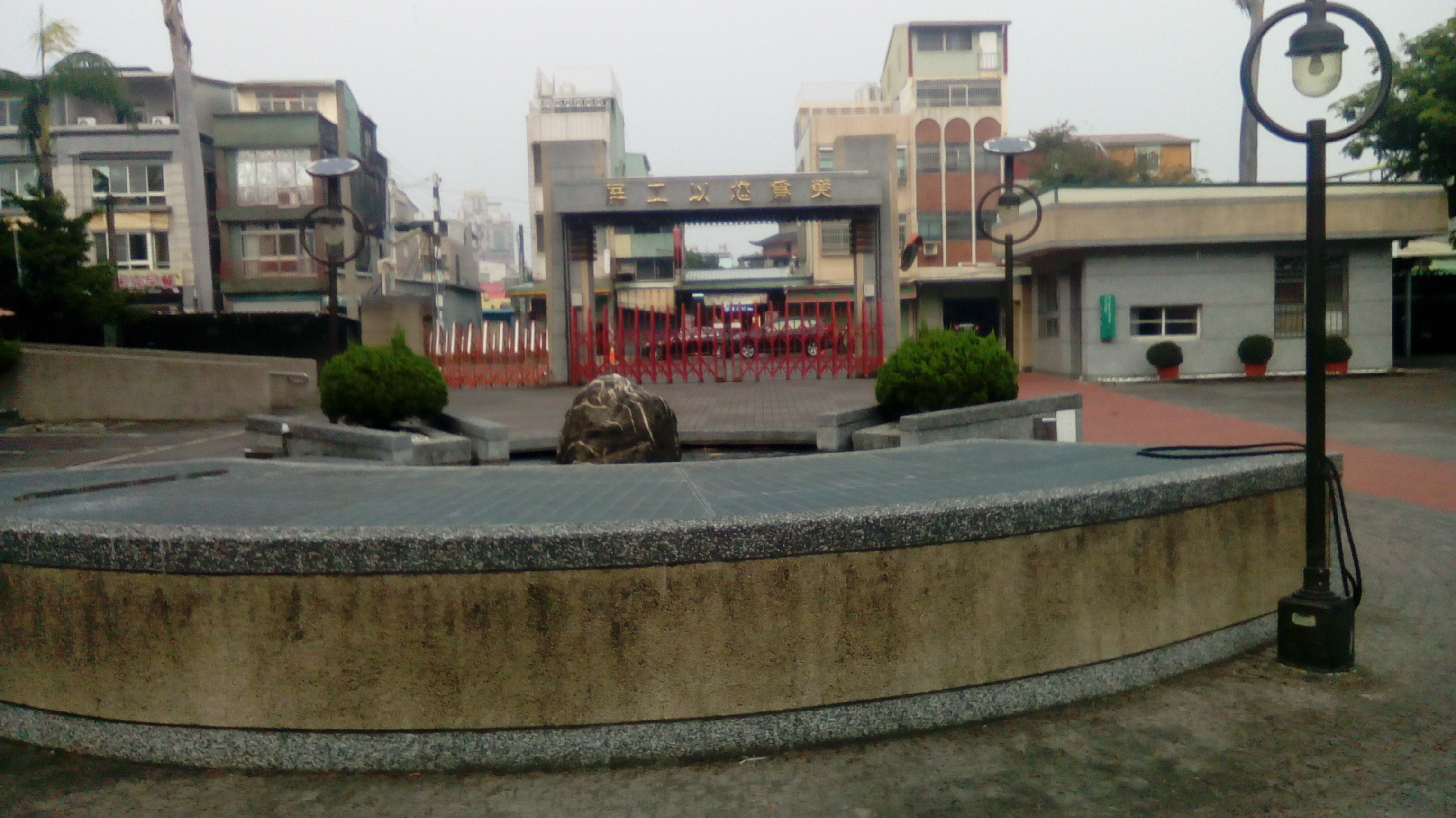 同上